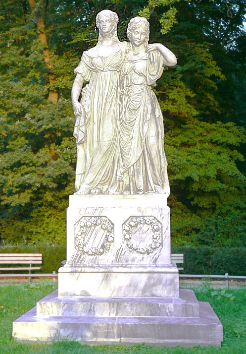 Die Prinzessinnengruppe in Hannover an der Eilenriede, eine Kopie von Valentino Casal nach dem Vorbild von Johann Gottfried Schadow. Ein Geschenk Kaiser Wilhelms II an die Stadt Hannover, enthüllt von seinem Sohn Wilhelm, Kronprinz am 19. Juli 1910.